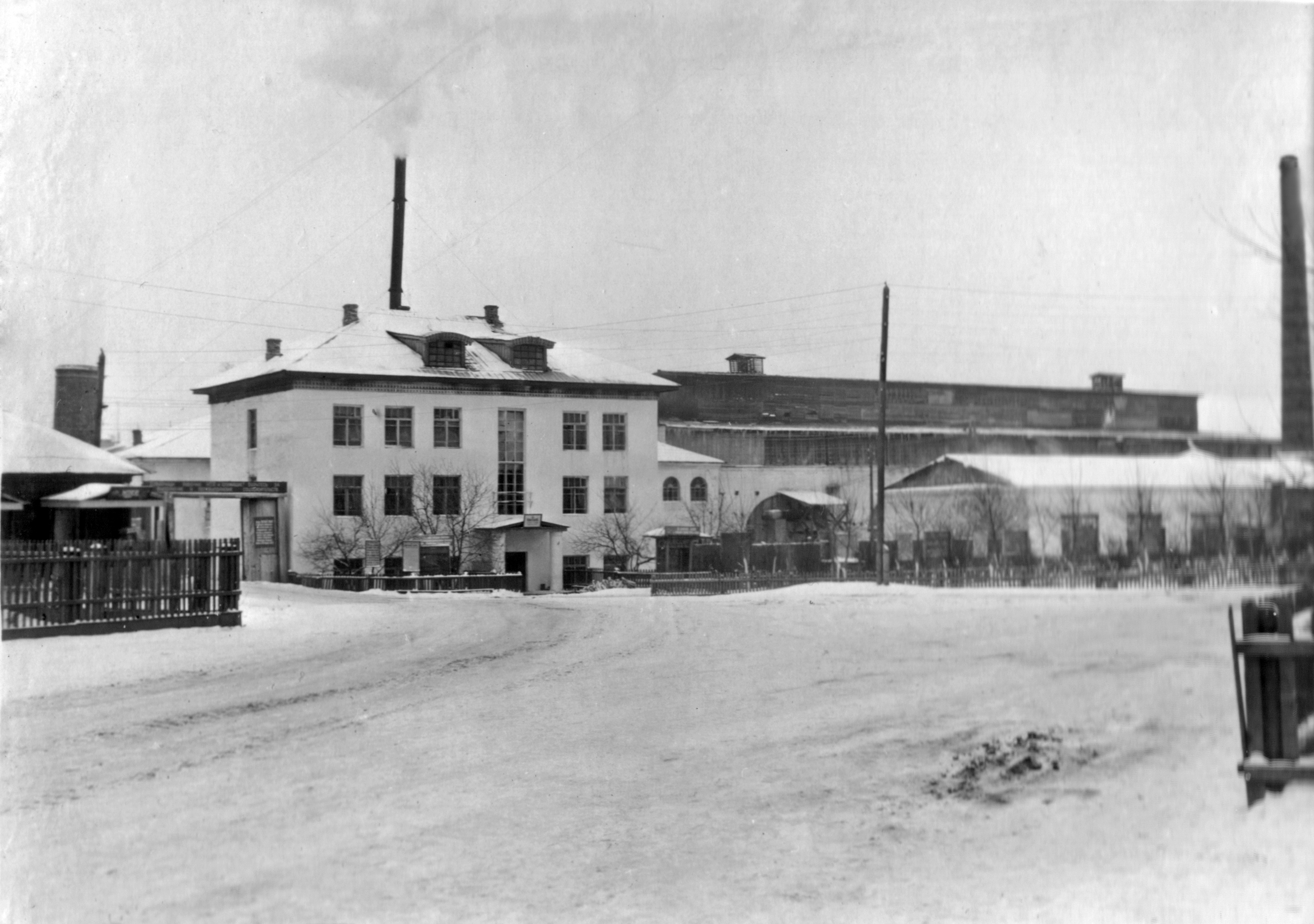 Стекольный завод